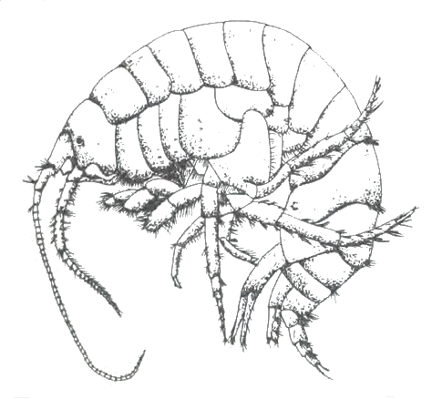 Austrogammarus australis Sayce, 1901